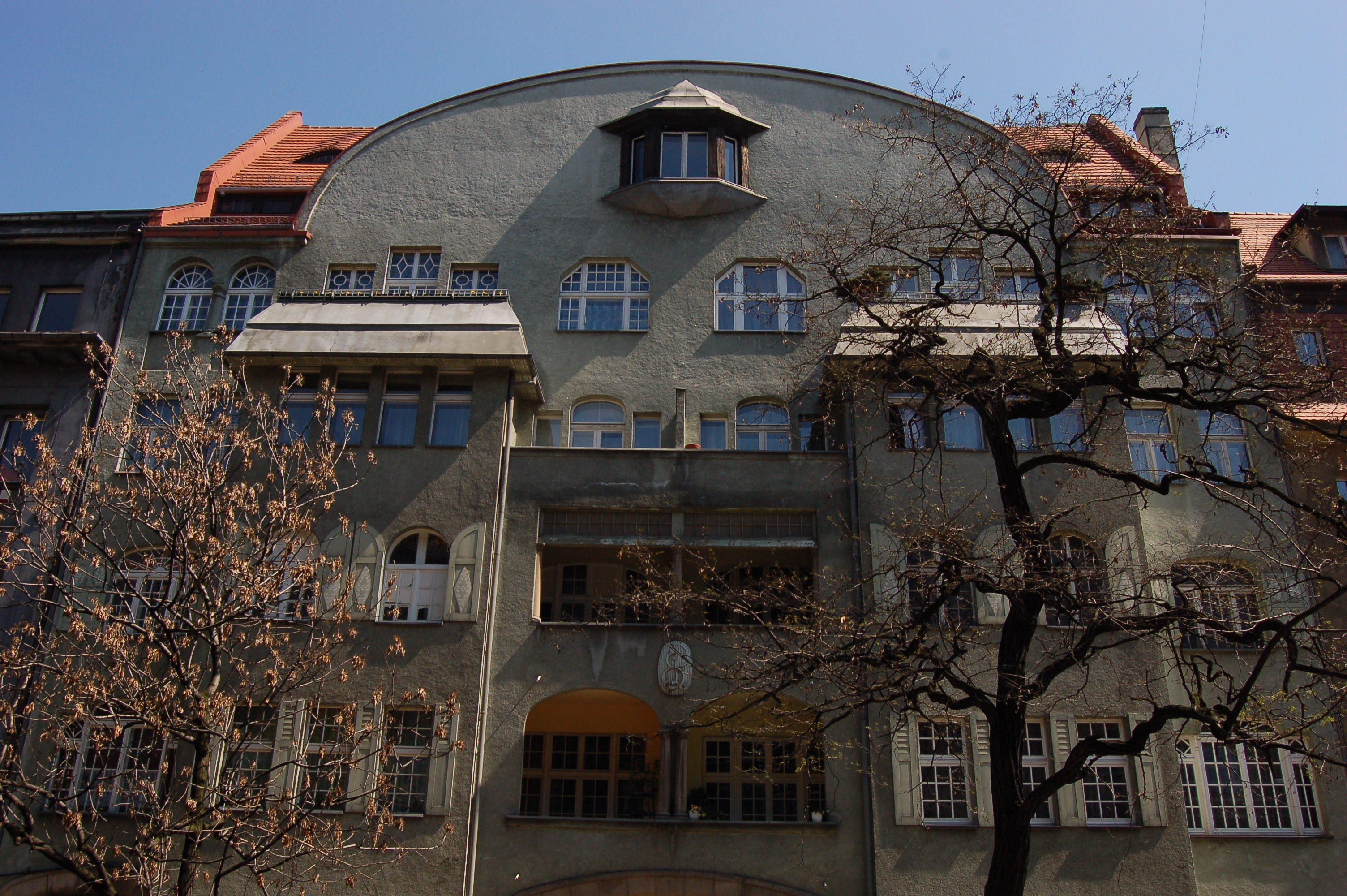 Katowice Wita Stwosza (lub Kochanowskiego)